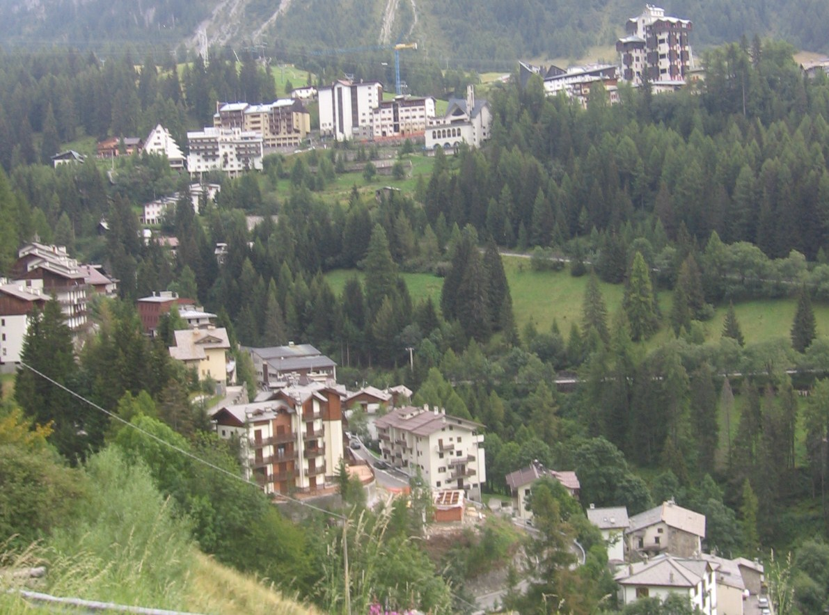 Foppolo, Bergamo, Italy